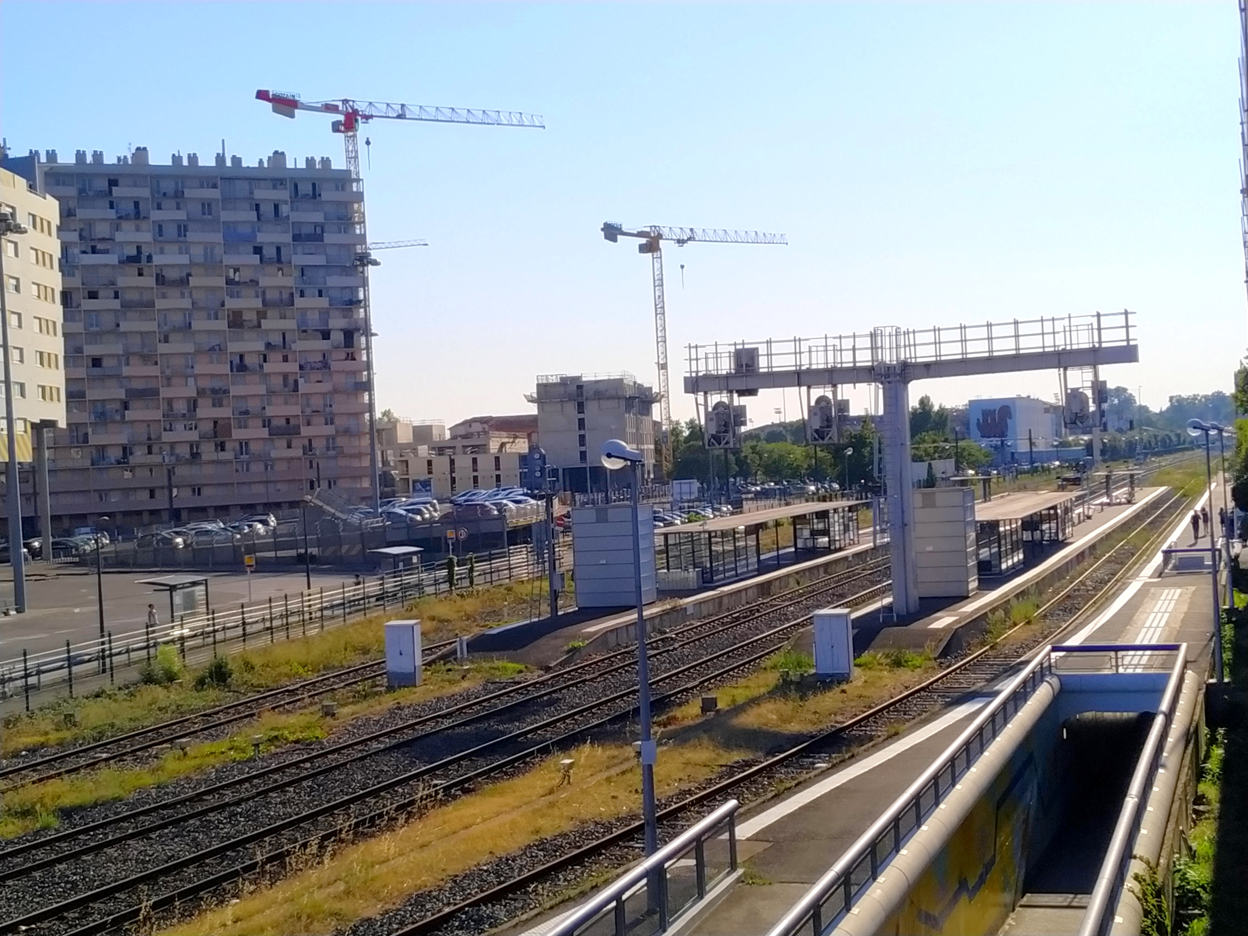 La gare des Arènes à Toulouse.